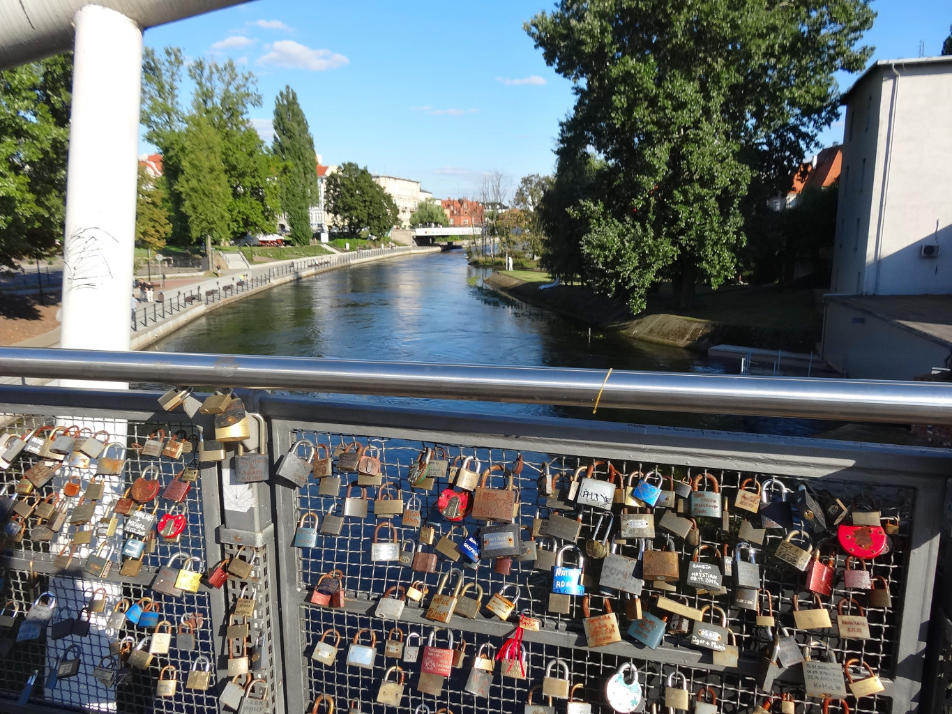 Kładka dla pieszych łącząca Wyspę Młyńską z Operą Nova i bulwarami nad Brdą